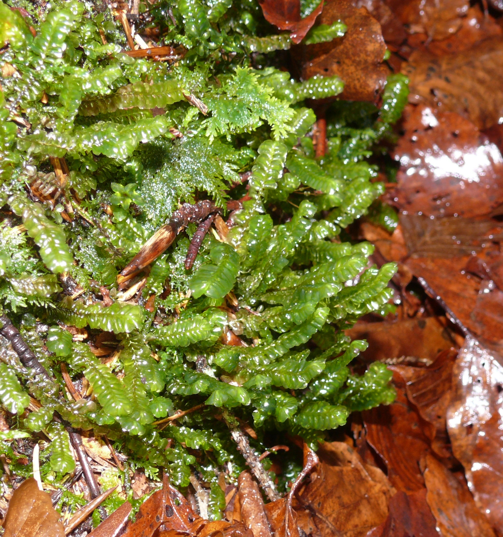 Plagiochila asplenioides, Schwäbisch-Fränkische Waldberge, Germany